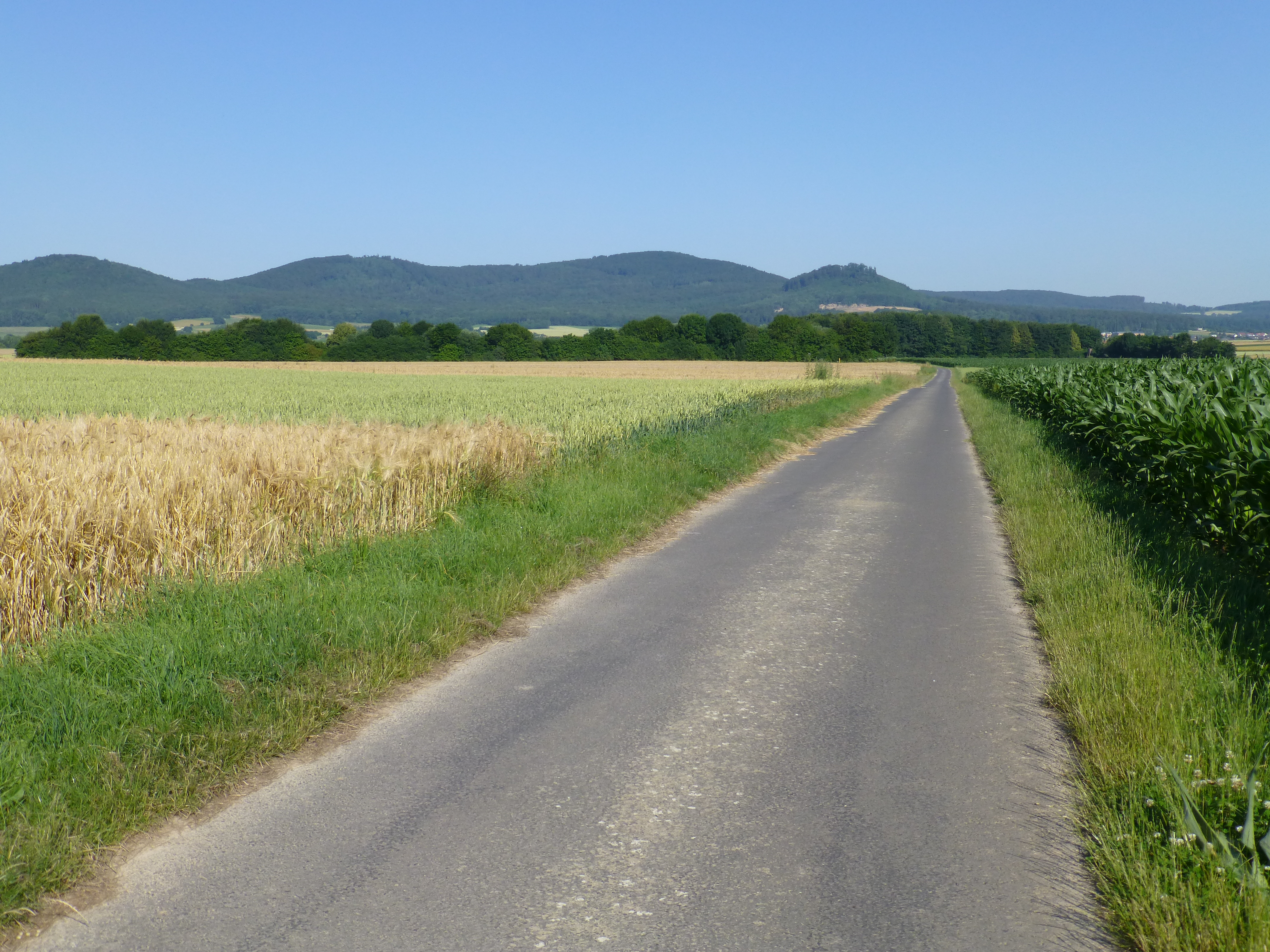 Blick von einem Fahrweg bei der Grillhütte Hertingshausen (am Hertingshausener Bach, nahe Kreisstraße 22) westnordwestwärts zu den Langenbergen: Bensberg (links), Laufskopf (mittig links), Schwengeberg (mittig rechts) und Burgberg (rechts)